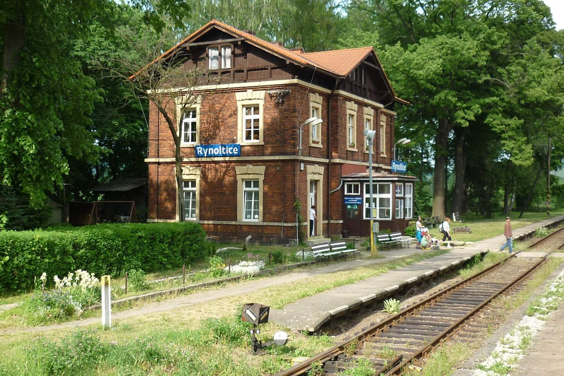 Rynoltice - vlakové nádraží